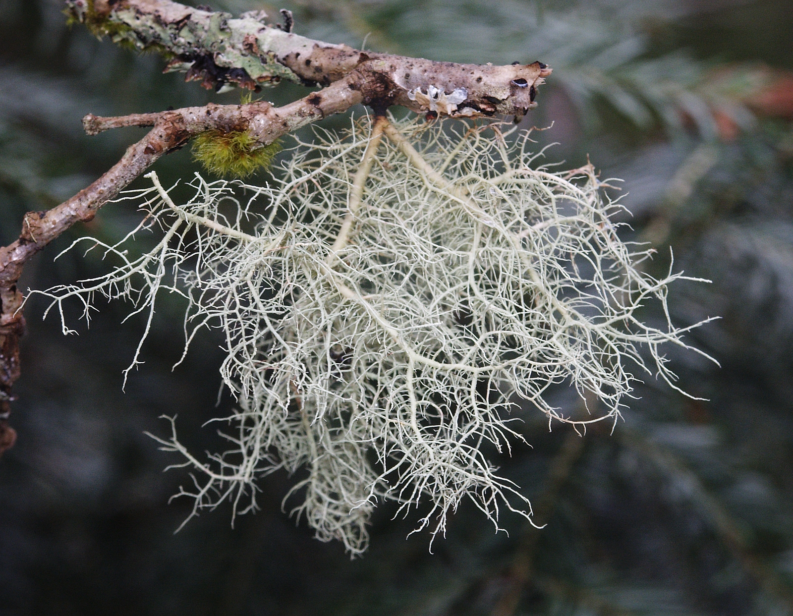 Usnea filipendula, Schwäbisch-Fränkischer Wald, Germany